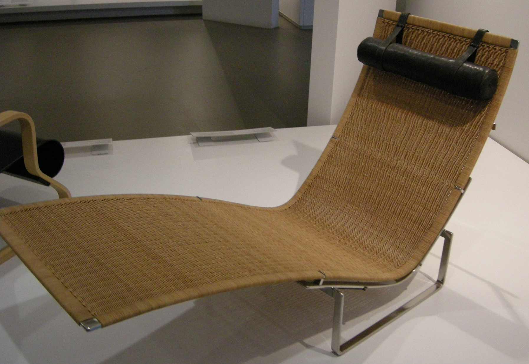 Ngv design, paul kjaerholm, hammock chair 25, 1965